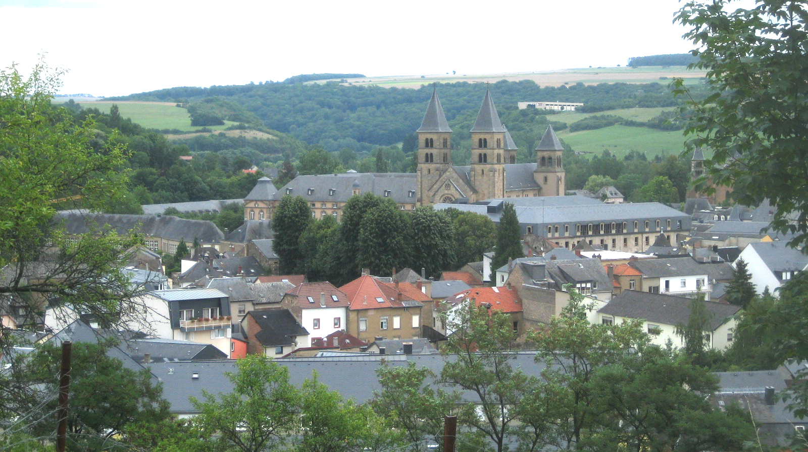 Vue op Iechternach